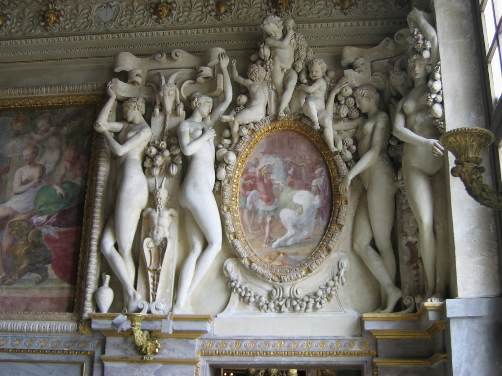 Escalier du roi